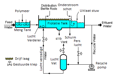 Algemene beschrijving DAF Unit. Nederlandstalige teksten toegevoegd aan het bestaande Engelstalige plaatje.